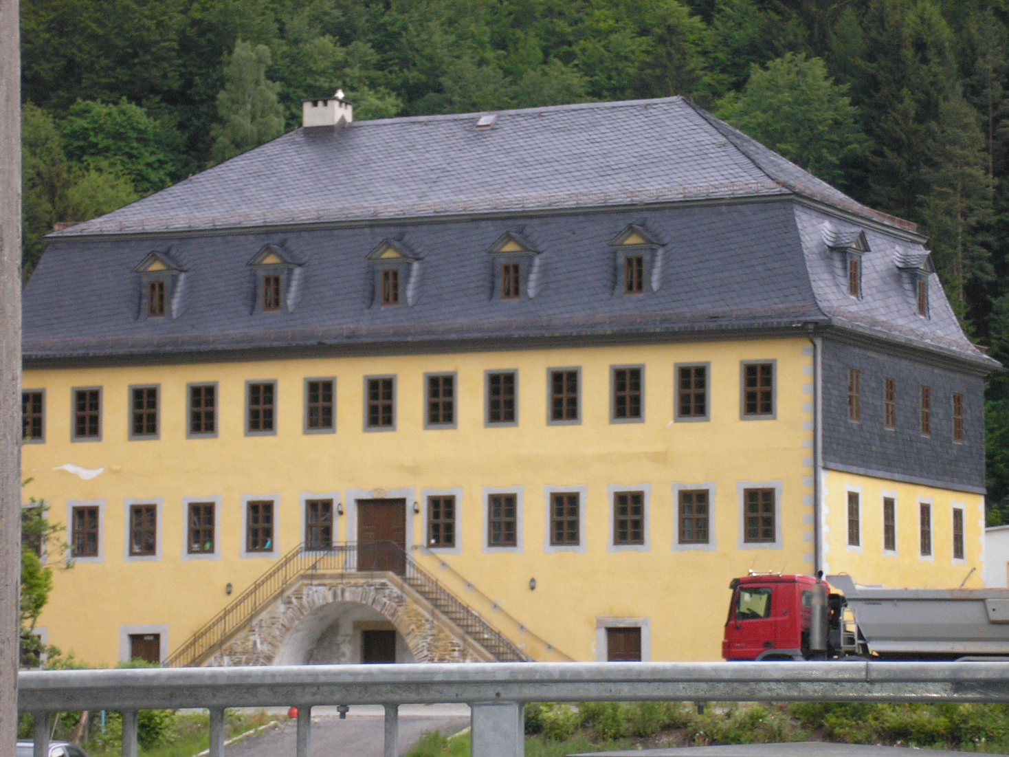 Das Rathaus von Katzhütte (Thüringen).